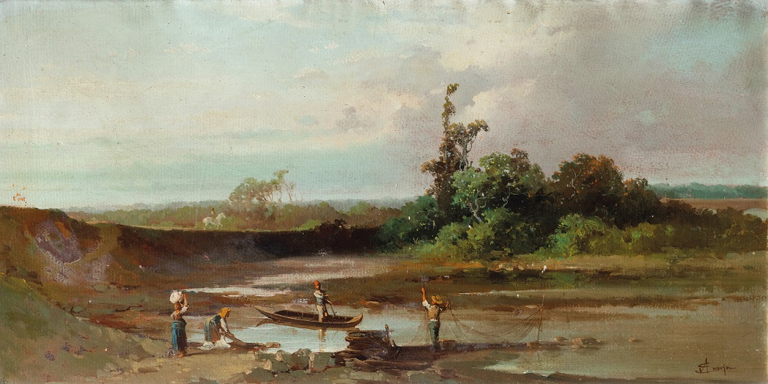 Pescatori e lavandaie sul Ticino, olio su cartone, 35 x 68 cm., firmato, coll. privata